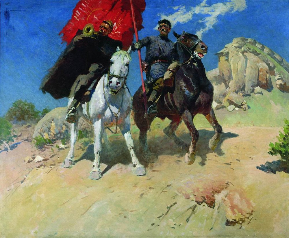 Знаменщик и трубач. 1934 Холст, масло. 130 x 161 см Центральный музей Вооруженных Сил